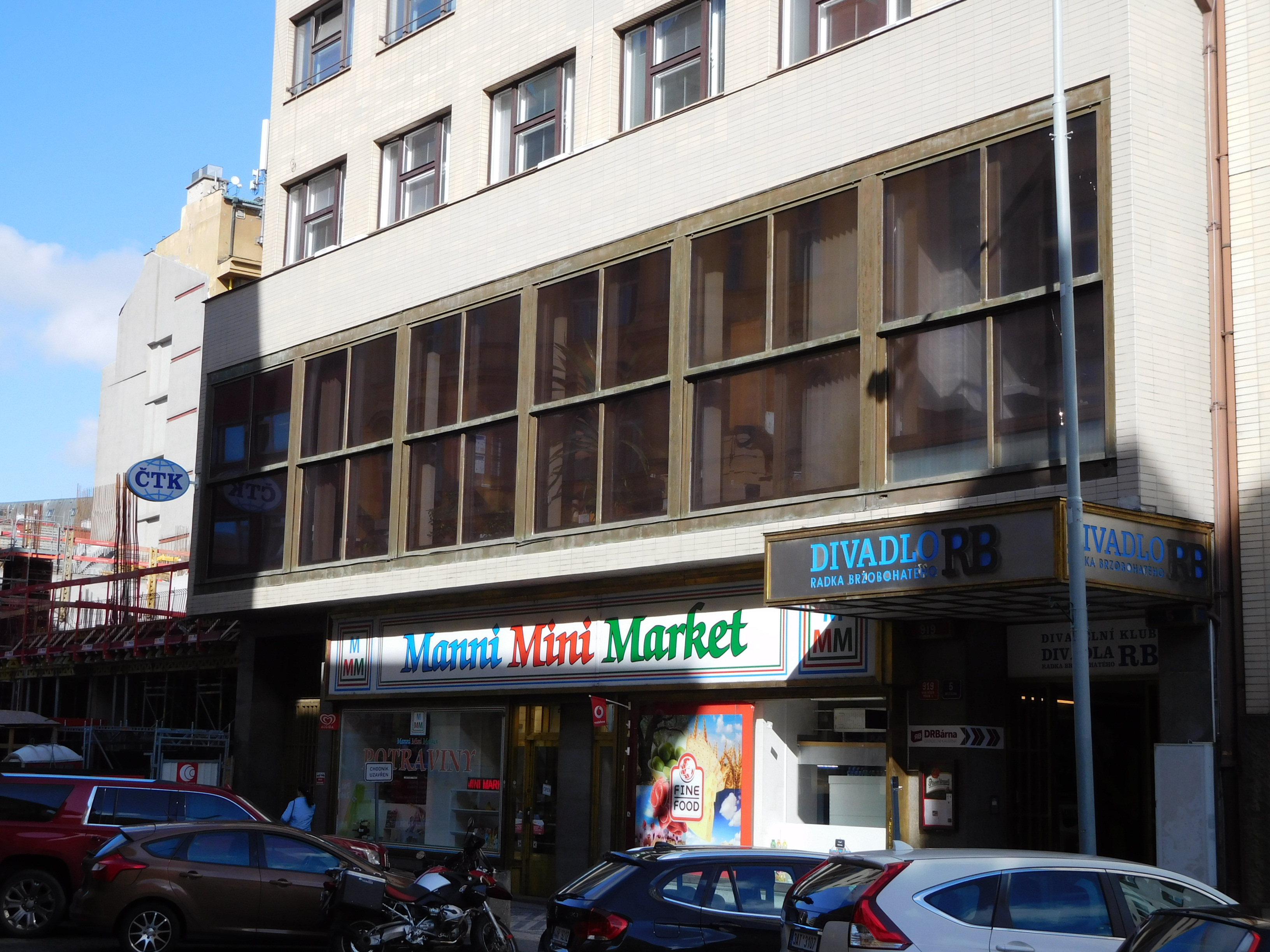 Praha - Nové Město, Opletalova 5; ČTK a Divadlo Radka Brzobohatého